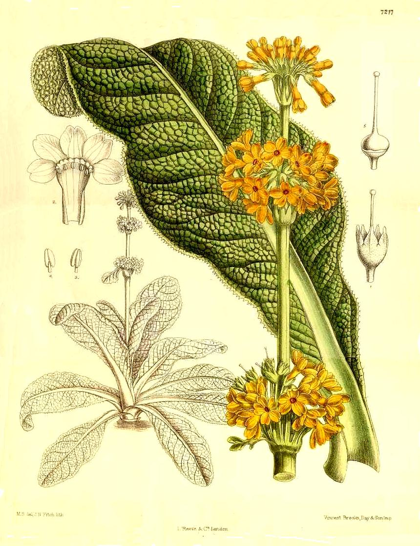 Primula imperialis Jungh.